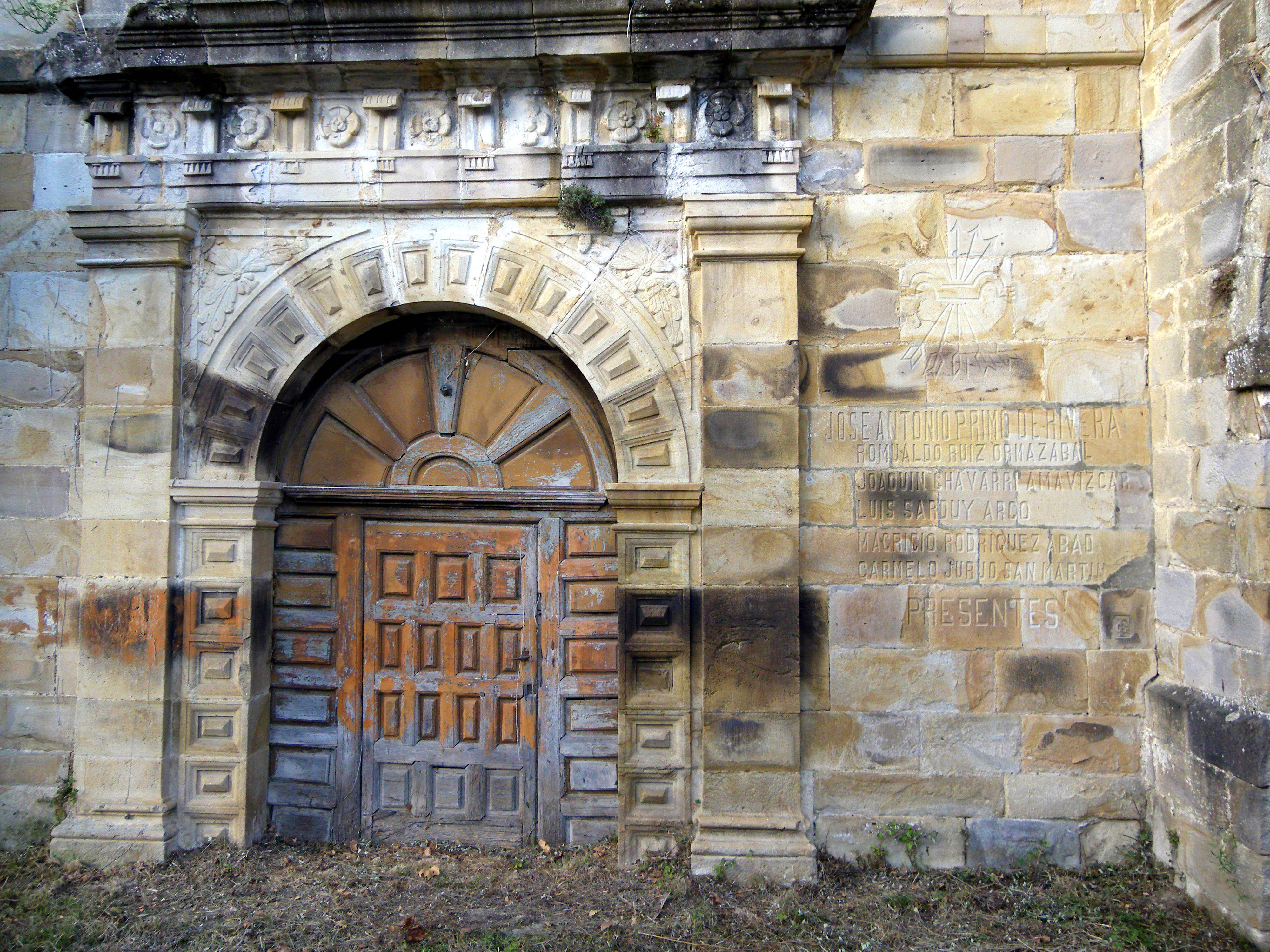 Portada de la Iglesia de Santa María, sita en el municipio Valle de Villaverde (Cantabria), con inscripción en la piedra de los caídos falangistas.